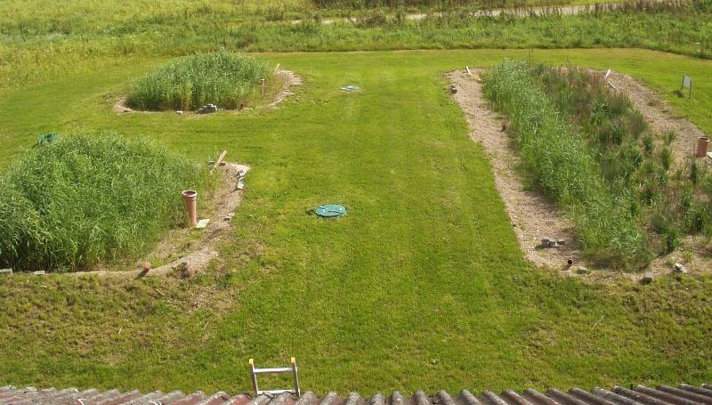 Gessamtansicht Pflanzkläranlage mit Klärschlammvererdung 20 EGW